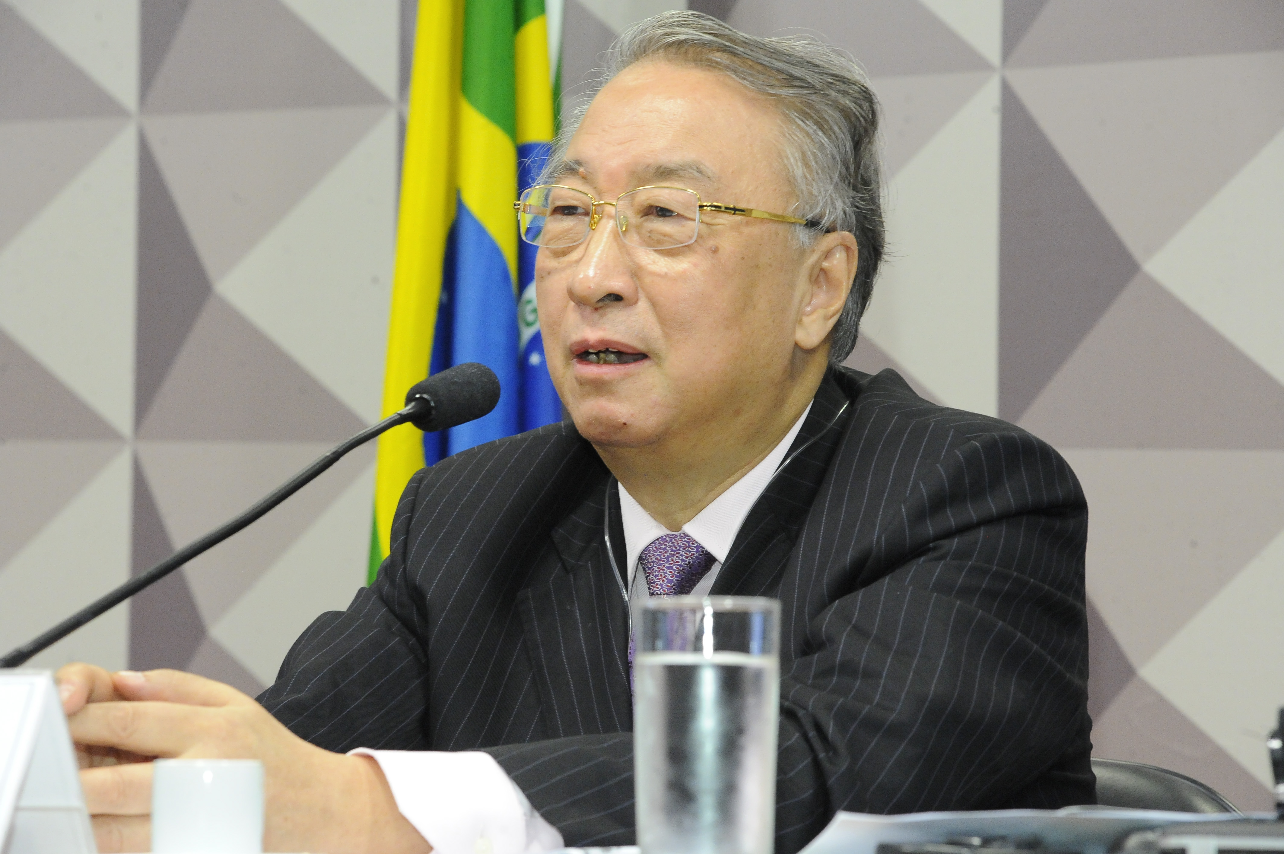 Comissão de Meio Ambiente do Senado (CMA) e a Comissão Mista Permanente sobre Mudanças Climáticas (CMMC) do Congresso Nacional, promovem um Colóquio Judicial para a América Latina e o Caribe sobre Constituições, Ambiente e Direitos Humanos. Em pronunciamento, presidente da IUCN, Zhang Xinsheng. Foto: Waldemir Barreto/Agência Senado